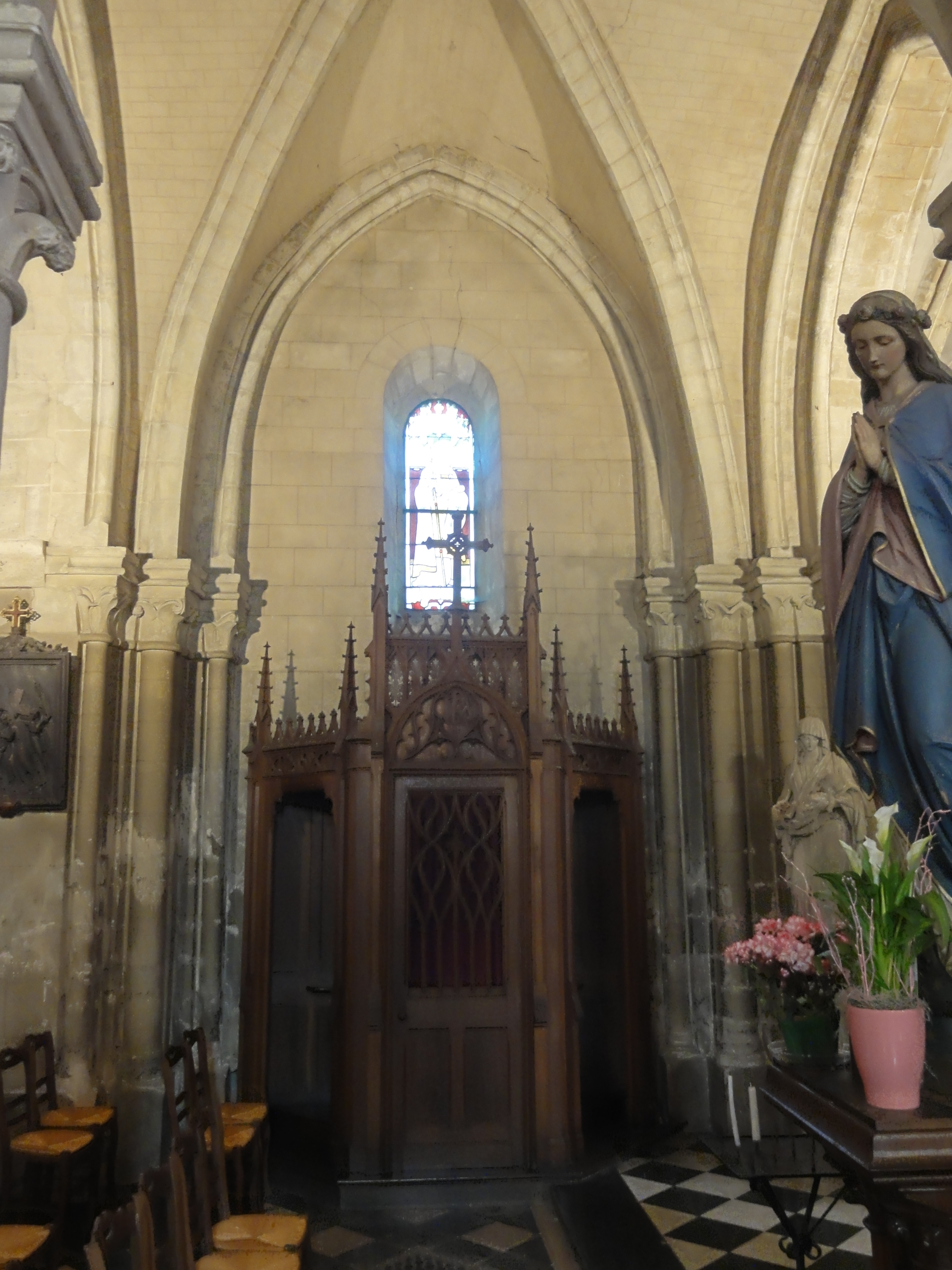 Voir titre.